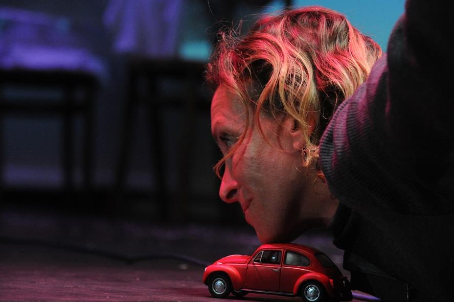 לני שחף מתוך רוחות מוראנוב